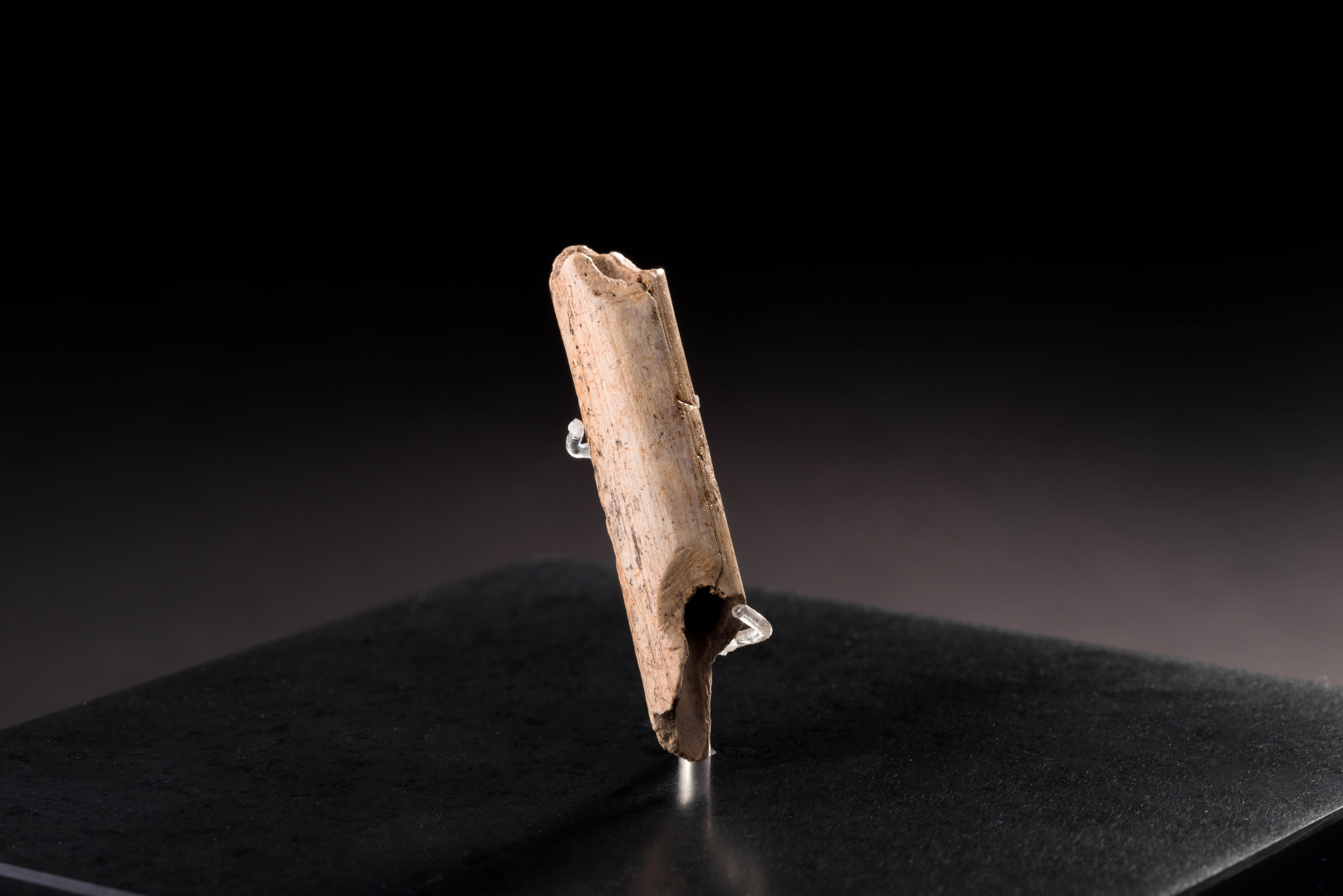 pfeifff